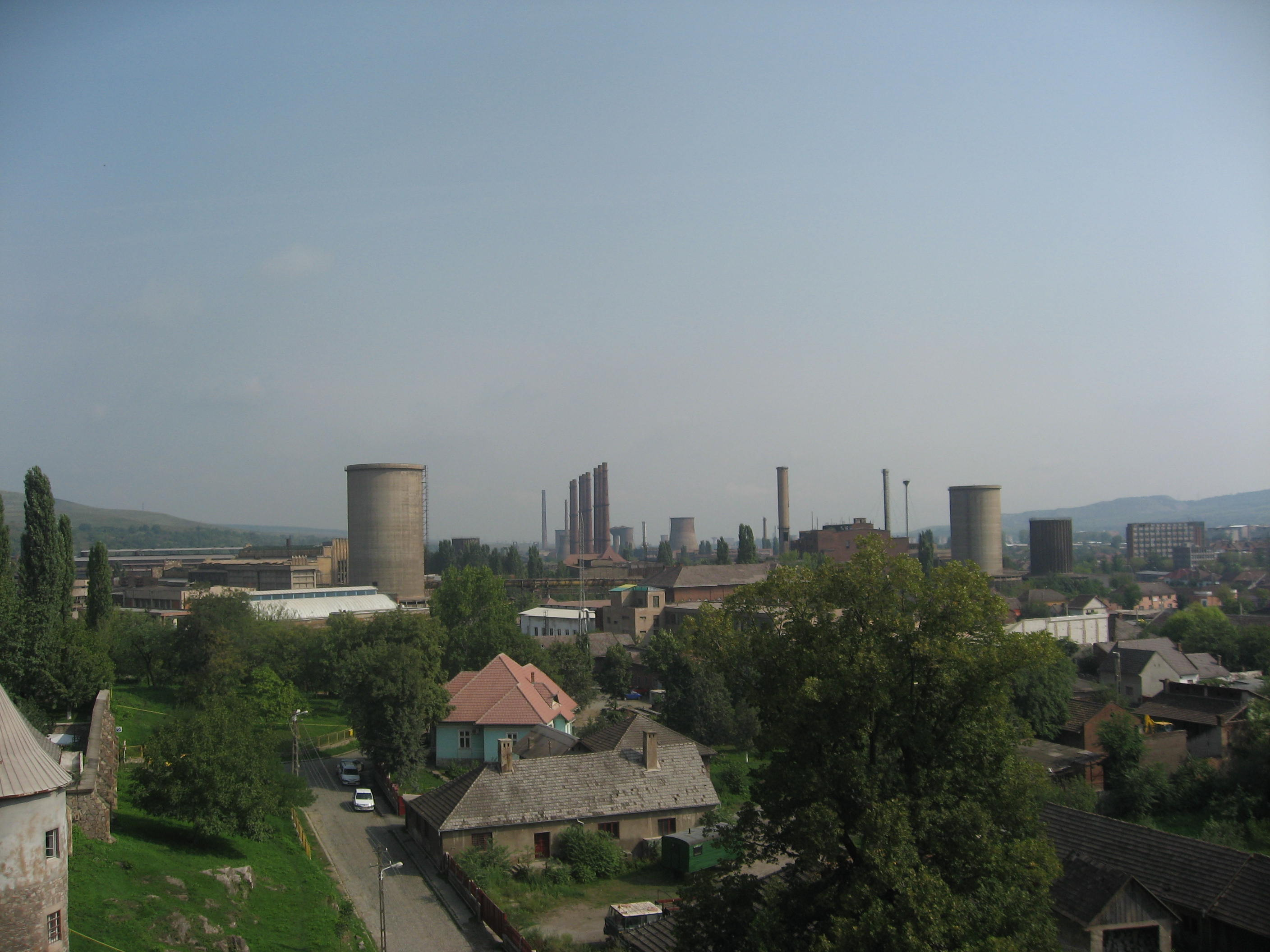 Hunedoara